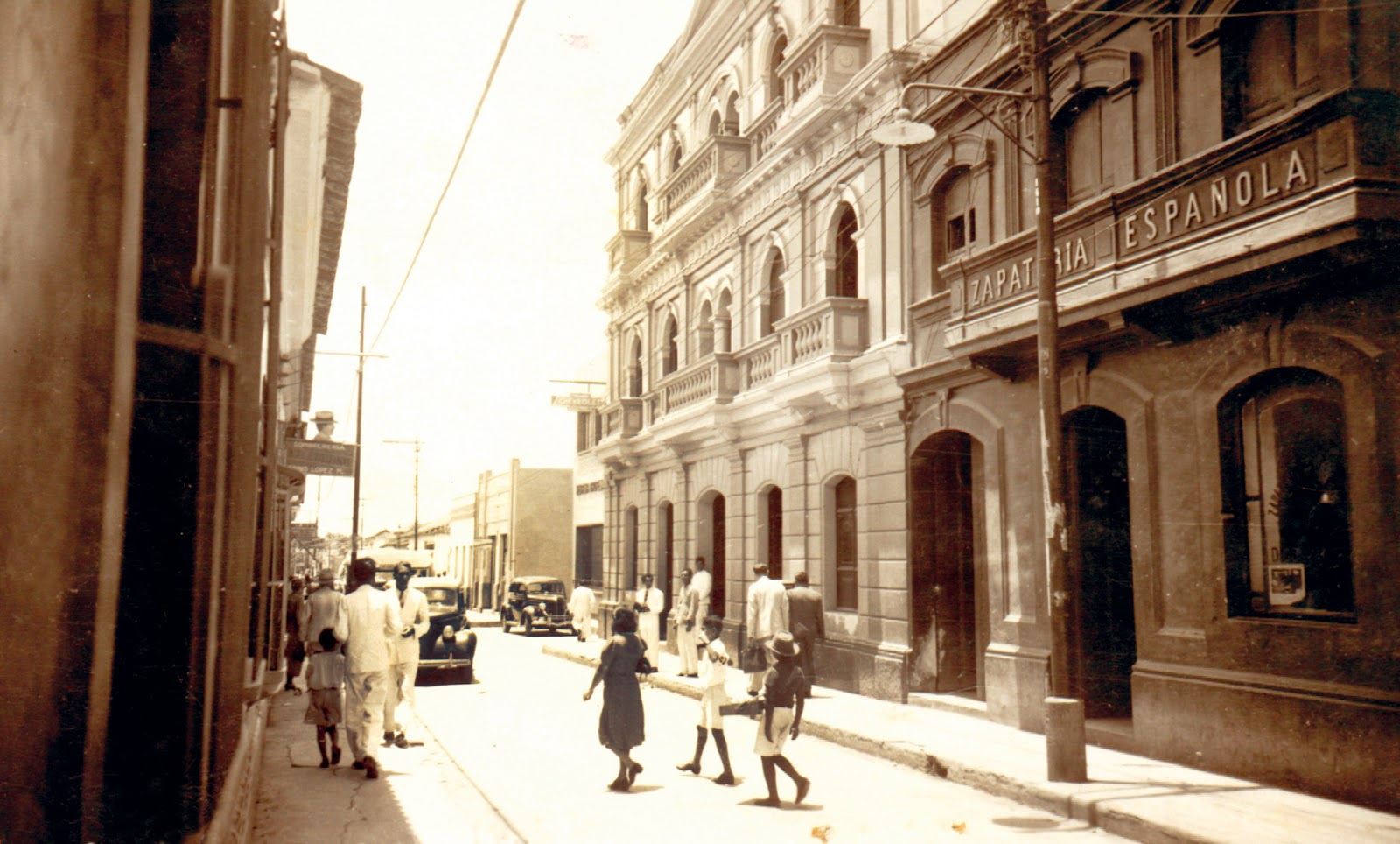 Calle Comercio de Barquisimeto (Hoy Avenida 20) en 1930, en primer plano edificio de Correos